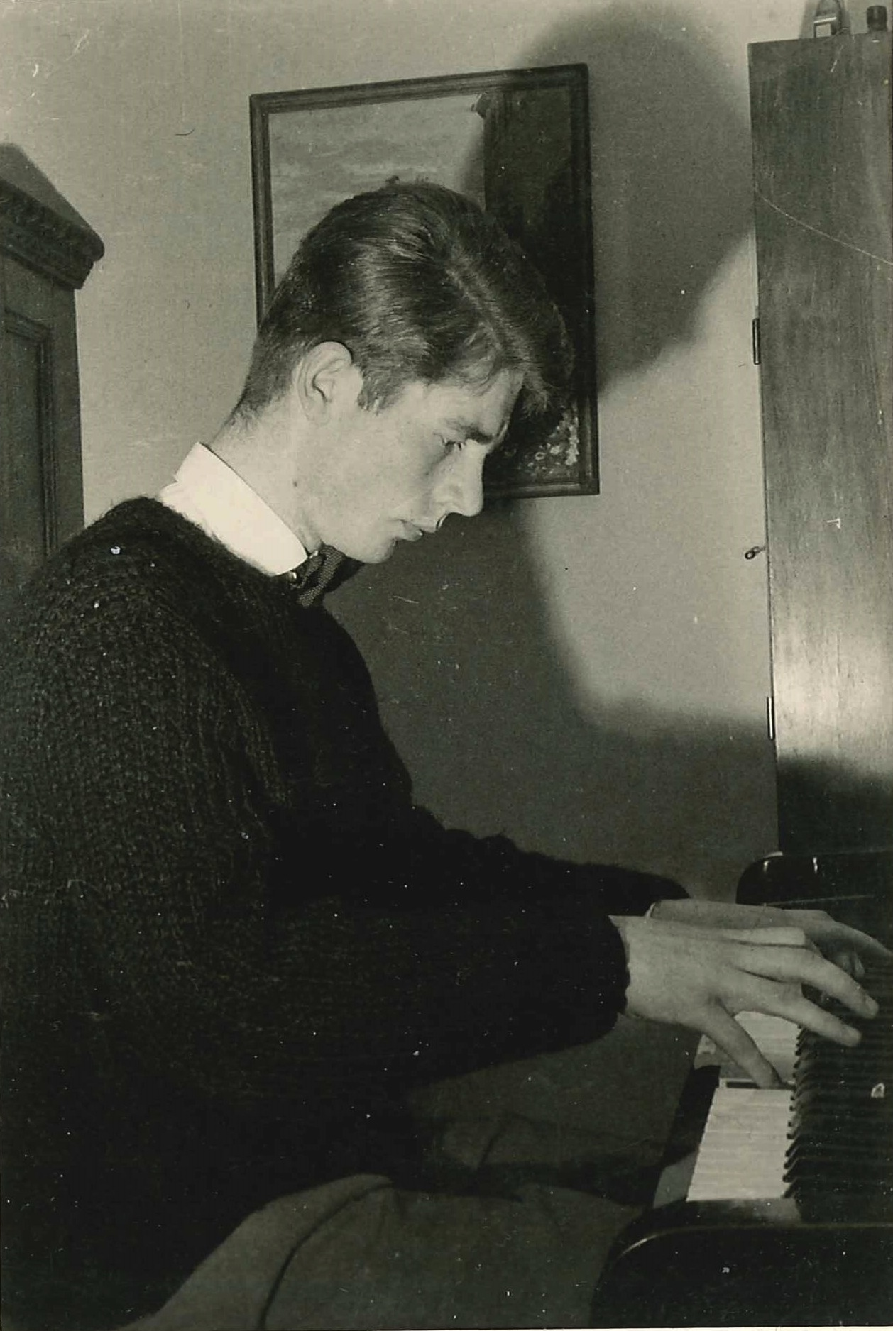 Hartmut Zelinsky als 18jähriger in seinem Elternhaus in Bamberg